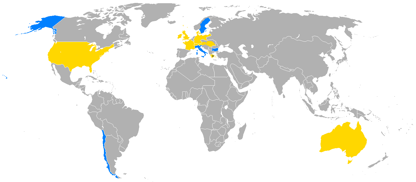 Mapa państw, które zdobyły medal na Igrzyskach olimpijskich w Atenach. Złoty dla krajów, które zdobyły co najmniej jeden złoty medal. Niebieski dla krajów, które nie zdobyły żadnego medalu.